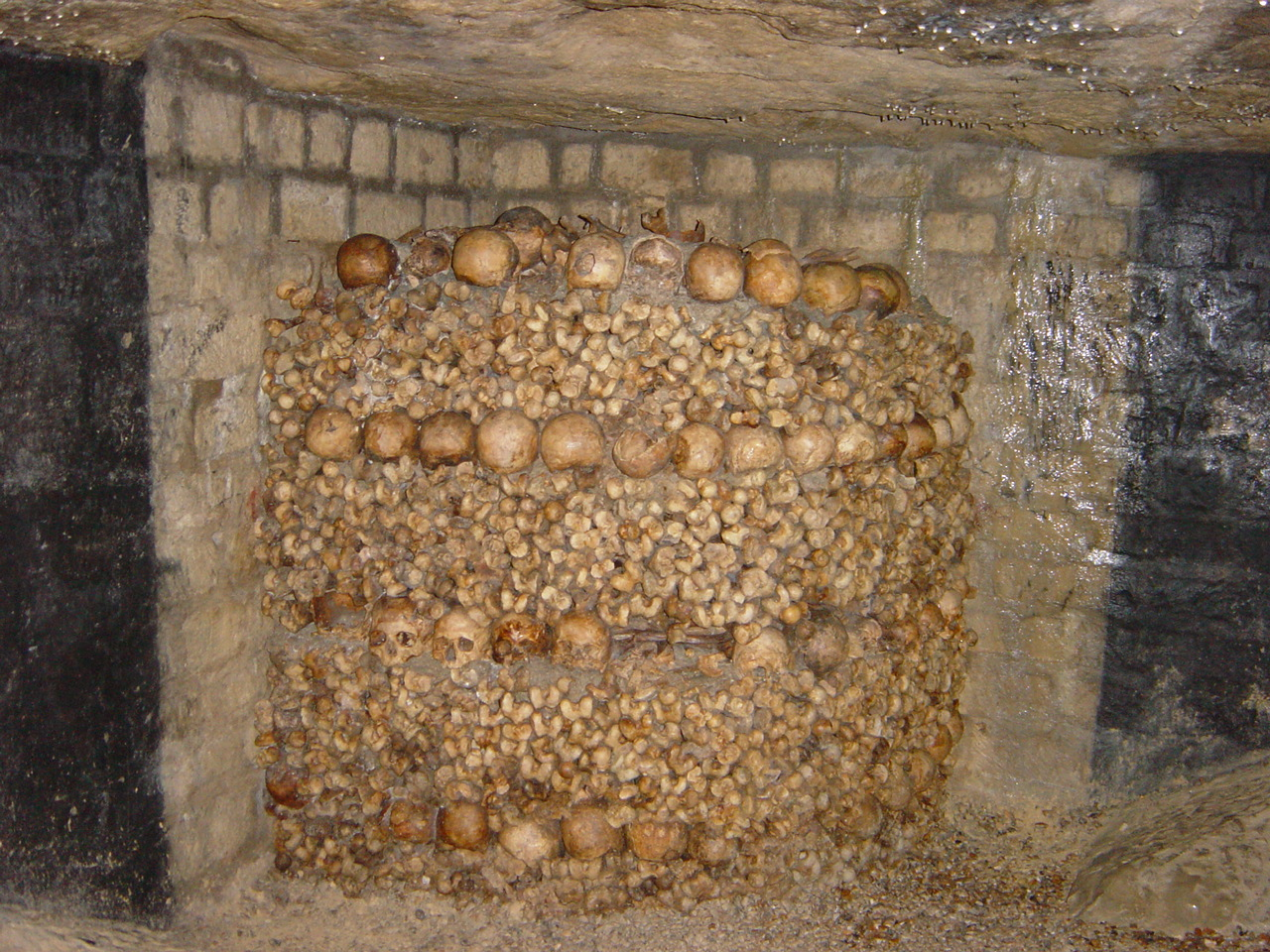 Opgetiermte Schanken an Doudekäpp an de Paräisser Katakomben.